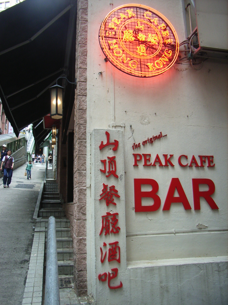 太平山頂的 Peak Cafe 山頂餐廳（峰景餐廳集團）租約期滿，2003年移至中環 SOHO 蘇豪區開設